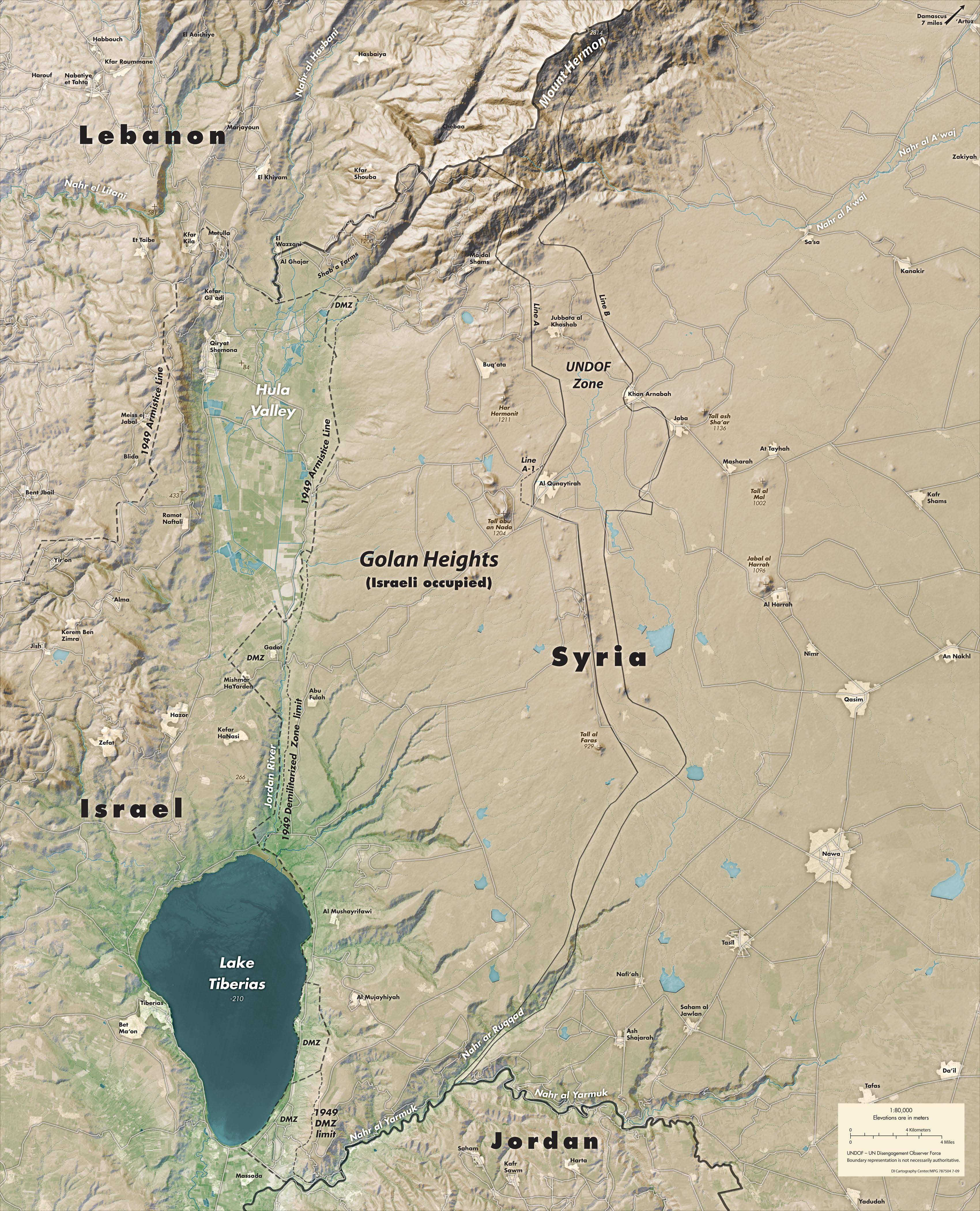 2009 Golan Heights 3D